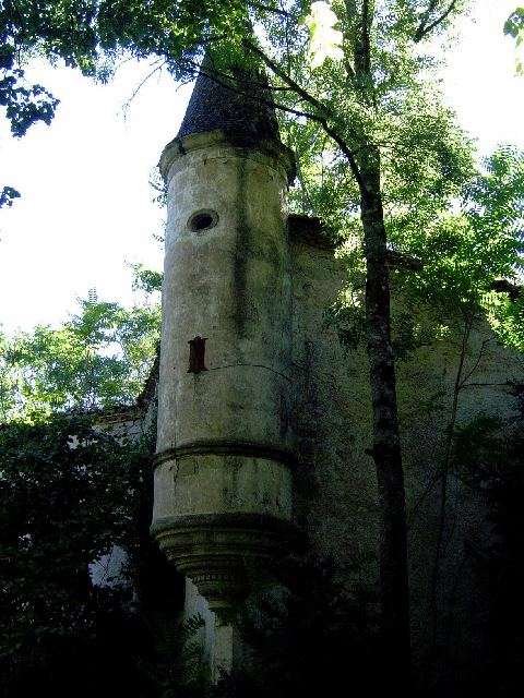 Montpinier's castle